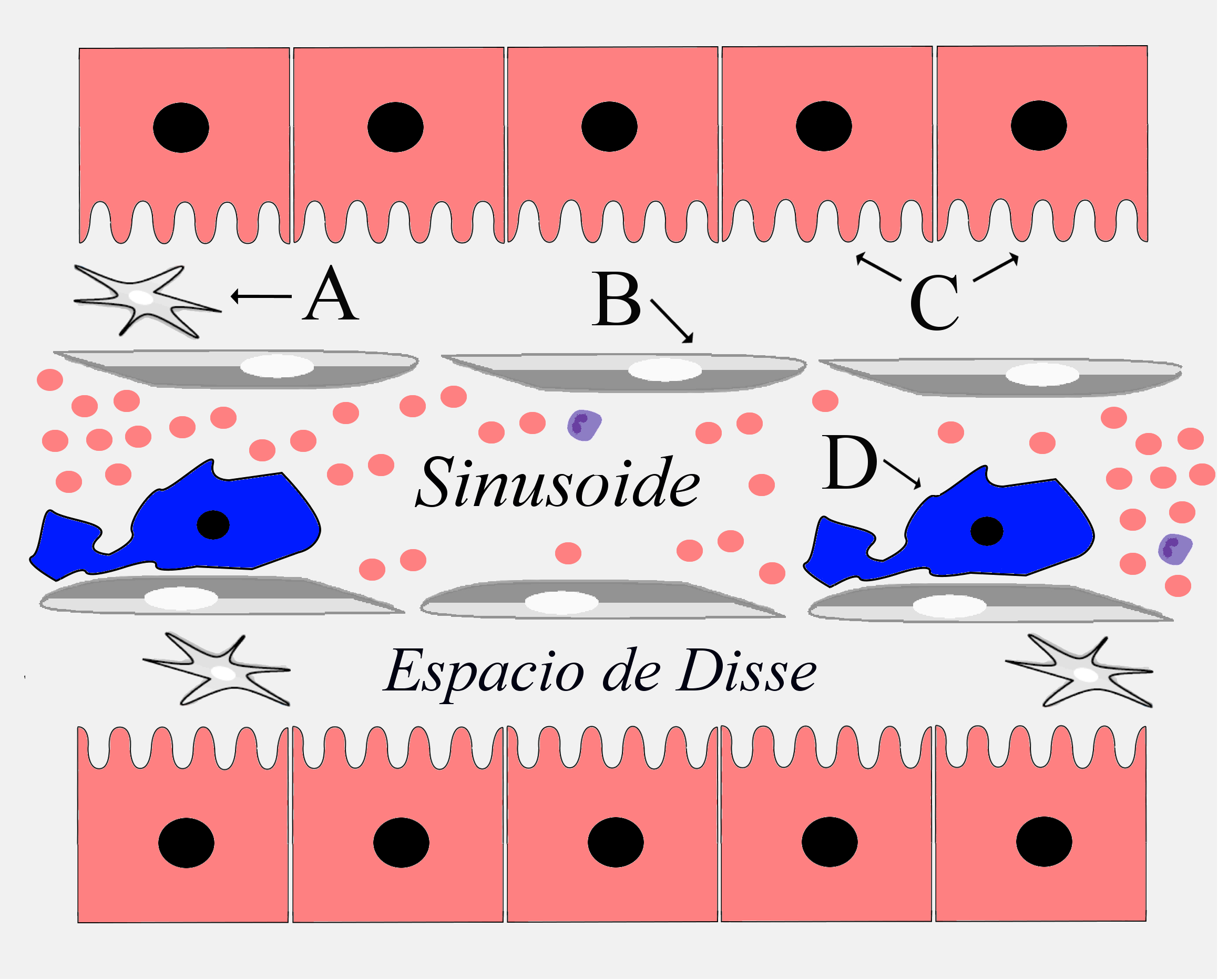 Imagen microscópica del sinusoide hepático con las principales células que lo forman.